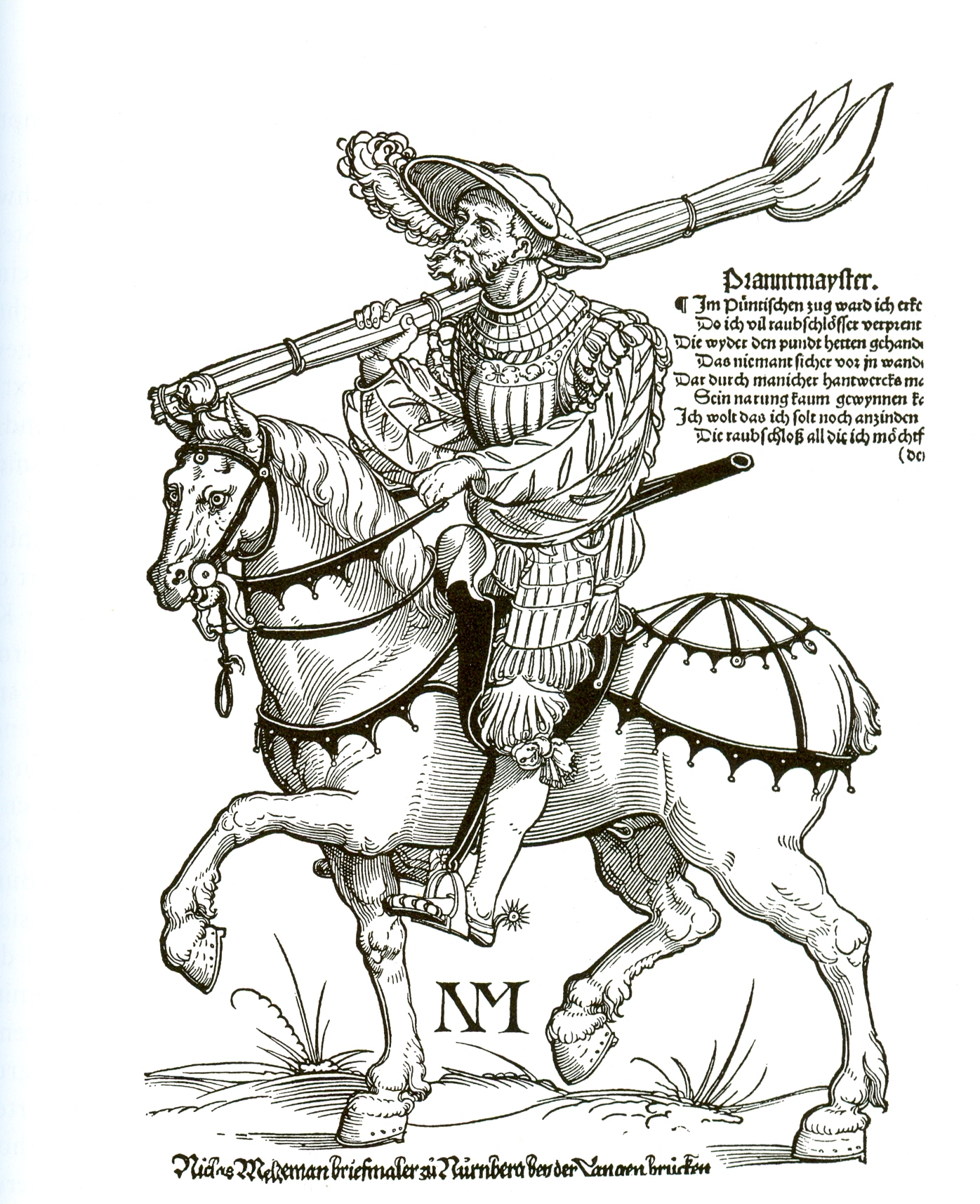 Der Brandmeister Holzschnitt Nürnberg, eingescannt aus: Horst Carl: Der Schwäbische Bund 1488 - 1534; Landfrieden und Genossenschaft im Übergang von Spätmittelalter zur Reformation; Leinfelden-Echterdingen, 2000; ISDN 3-87181-424-5, S. 363